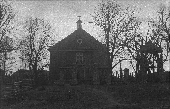 Беларуская (тарашкевіца): Масты Правыя (Masty Pravyja). Касьцёл